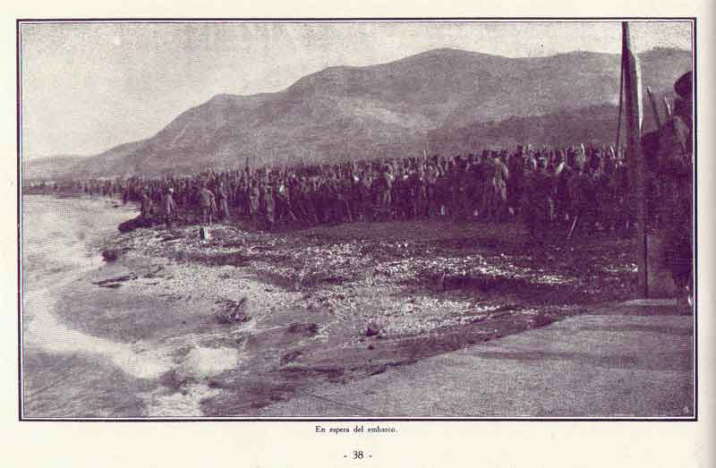 Srpska vojska čeka ukrcavanje u Albaniji.